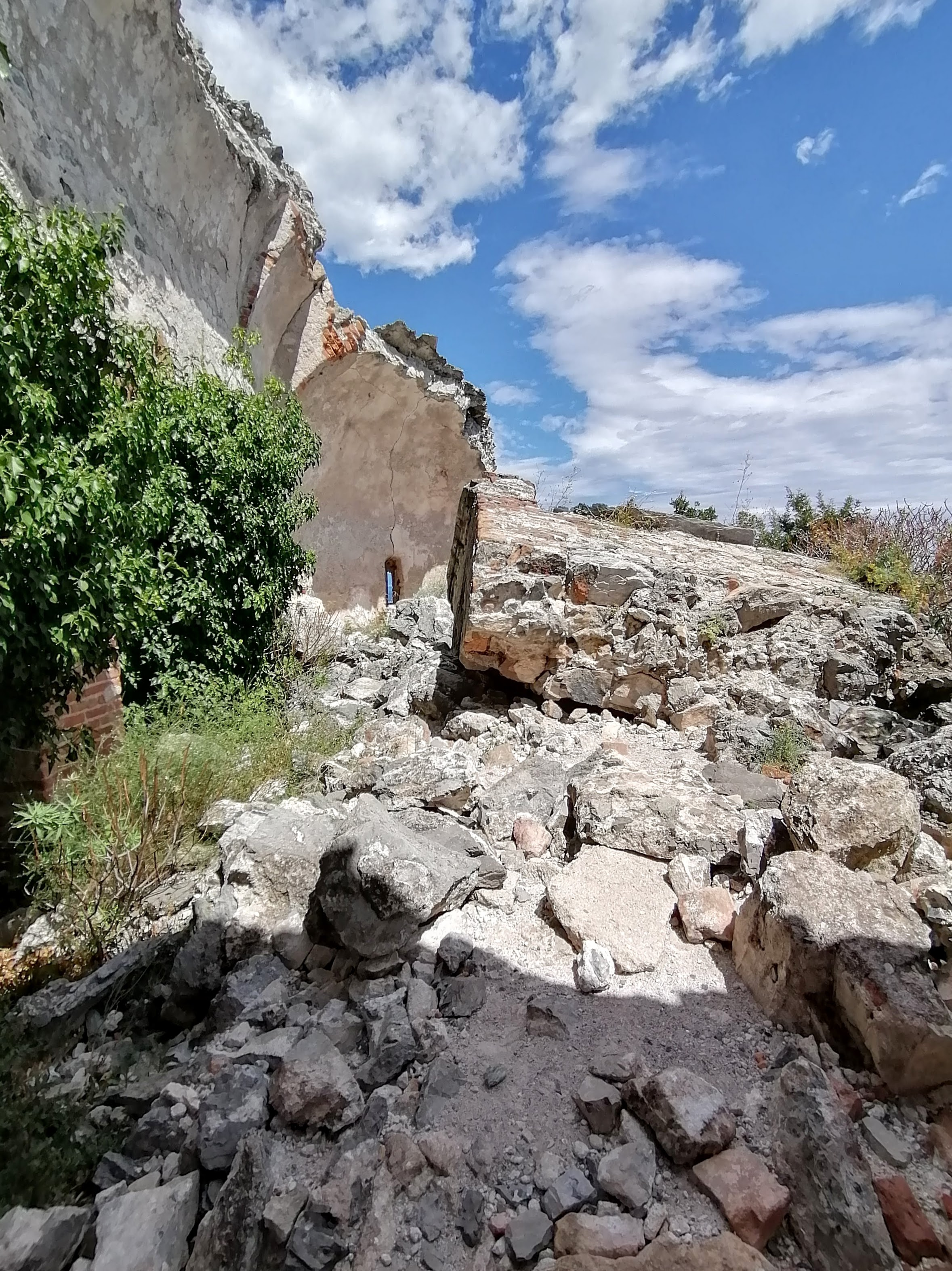 L'interno della Chiesa di Santa Giulia a Noli.